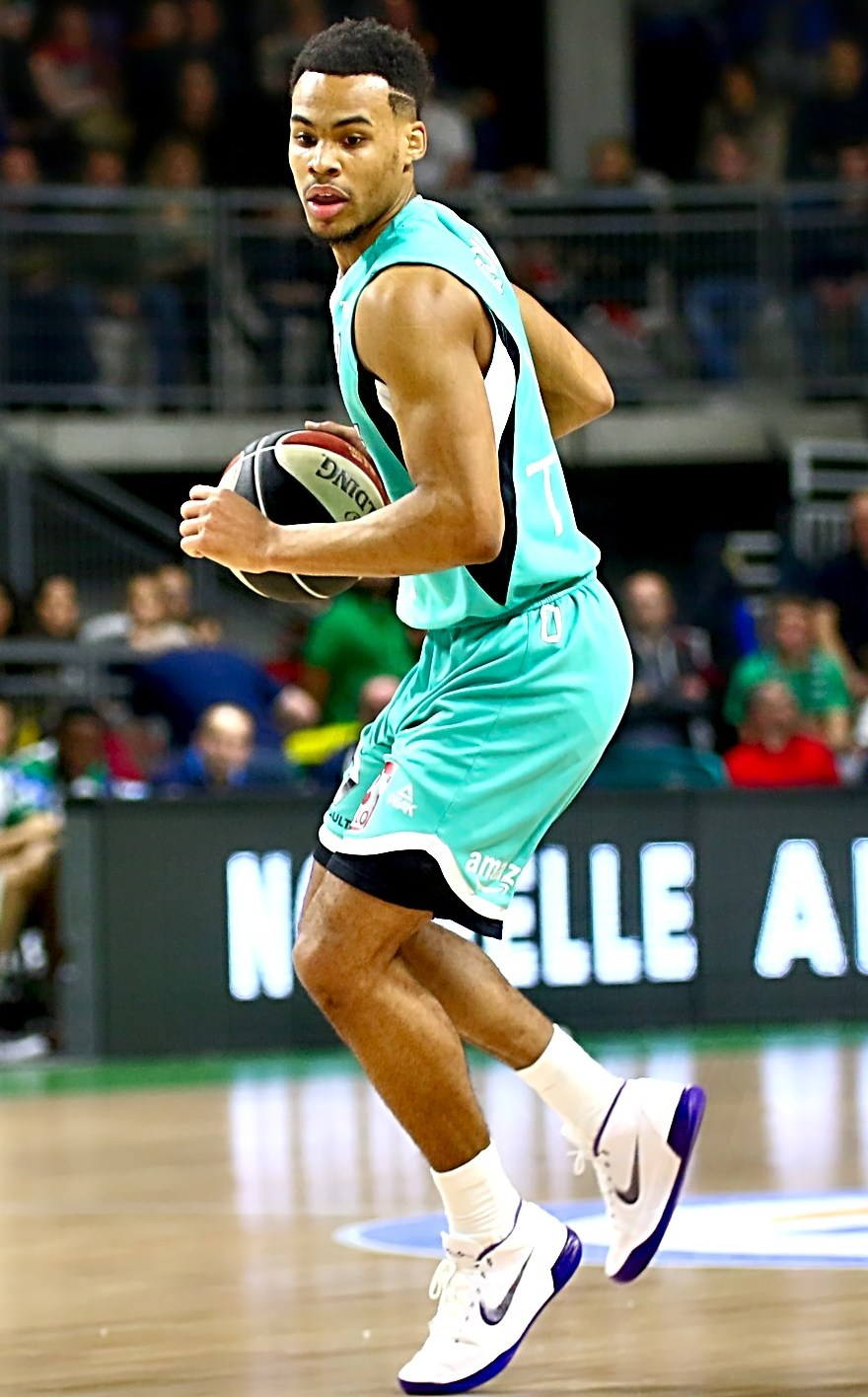 6Q3A1400